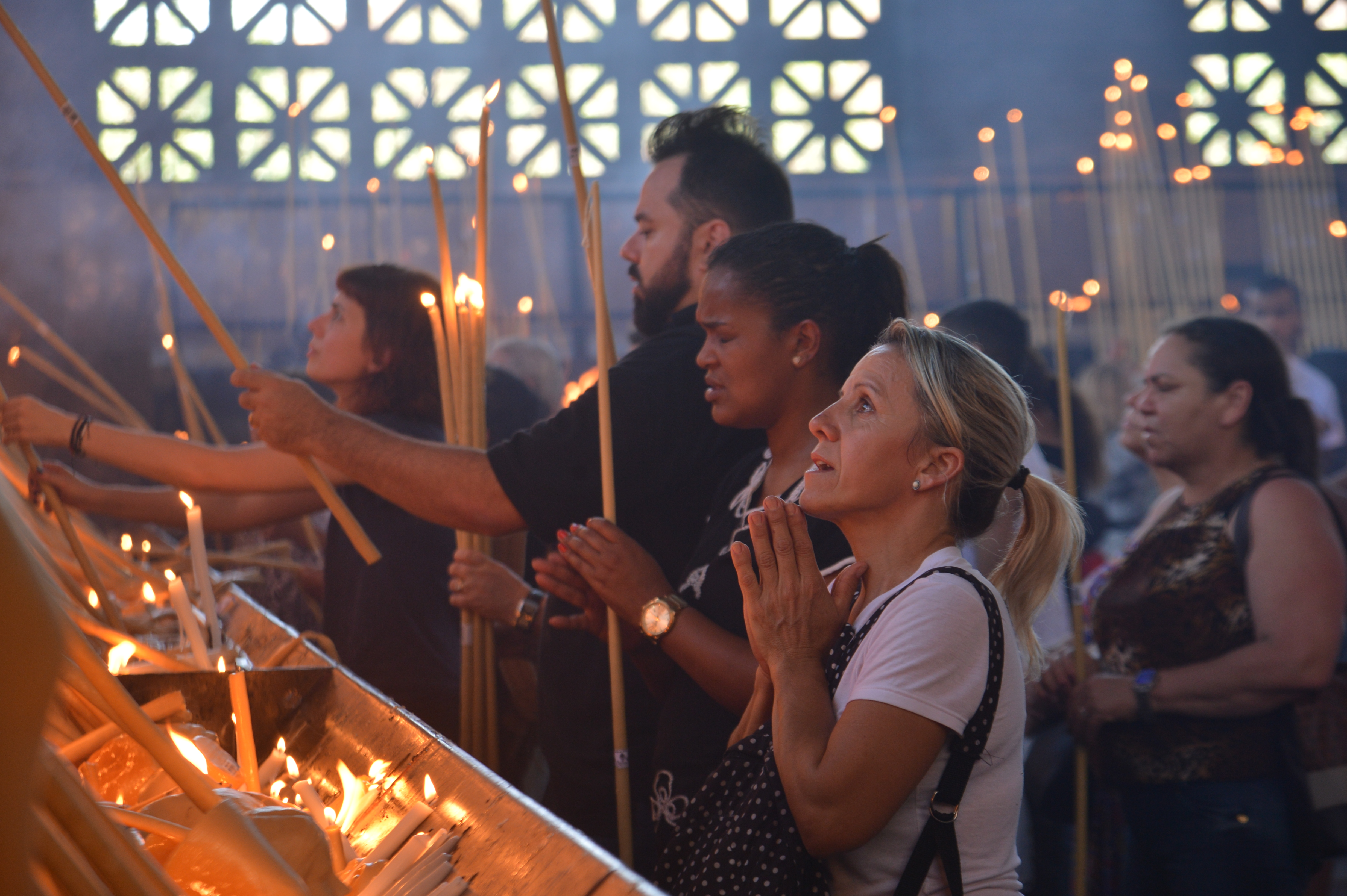 Aparecida (SP) - Devotos de Nossa Senhora Aparecida comparecem ao Santuário Nacional no dia da Padroeira do Brasil (Rovena Rosa/Agência Brasil)